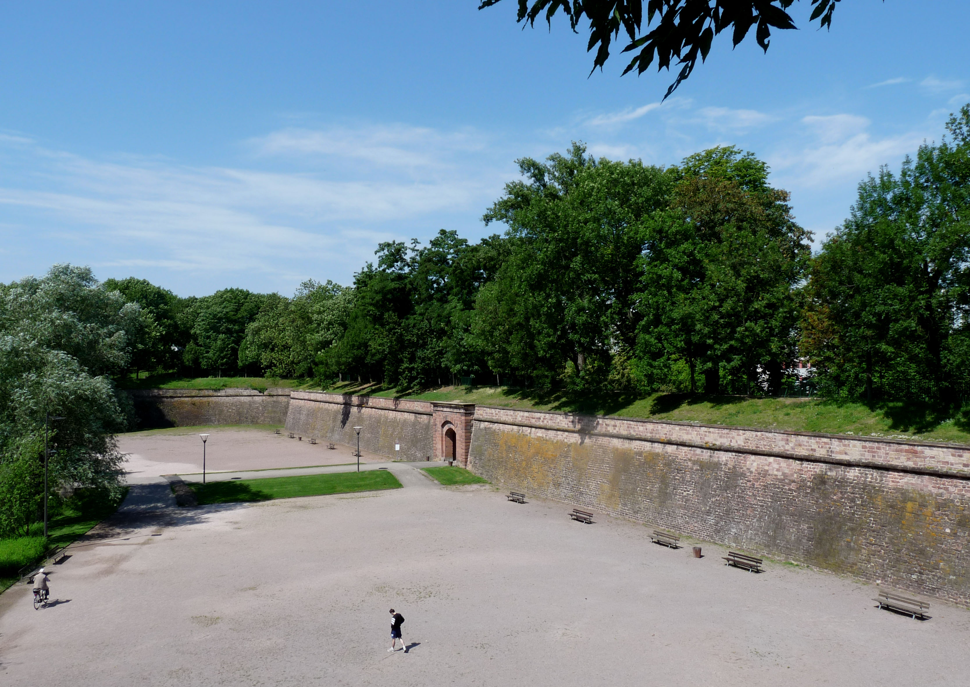 Fortification Vauban (Parc de la Citadelle, Strasbourg)